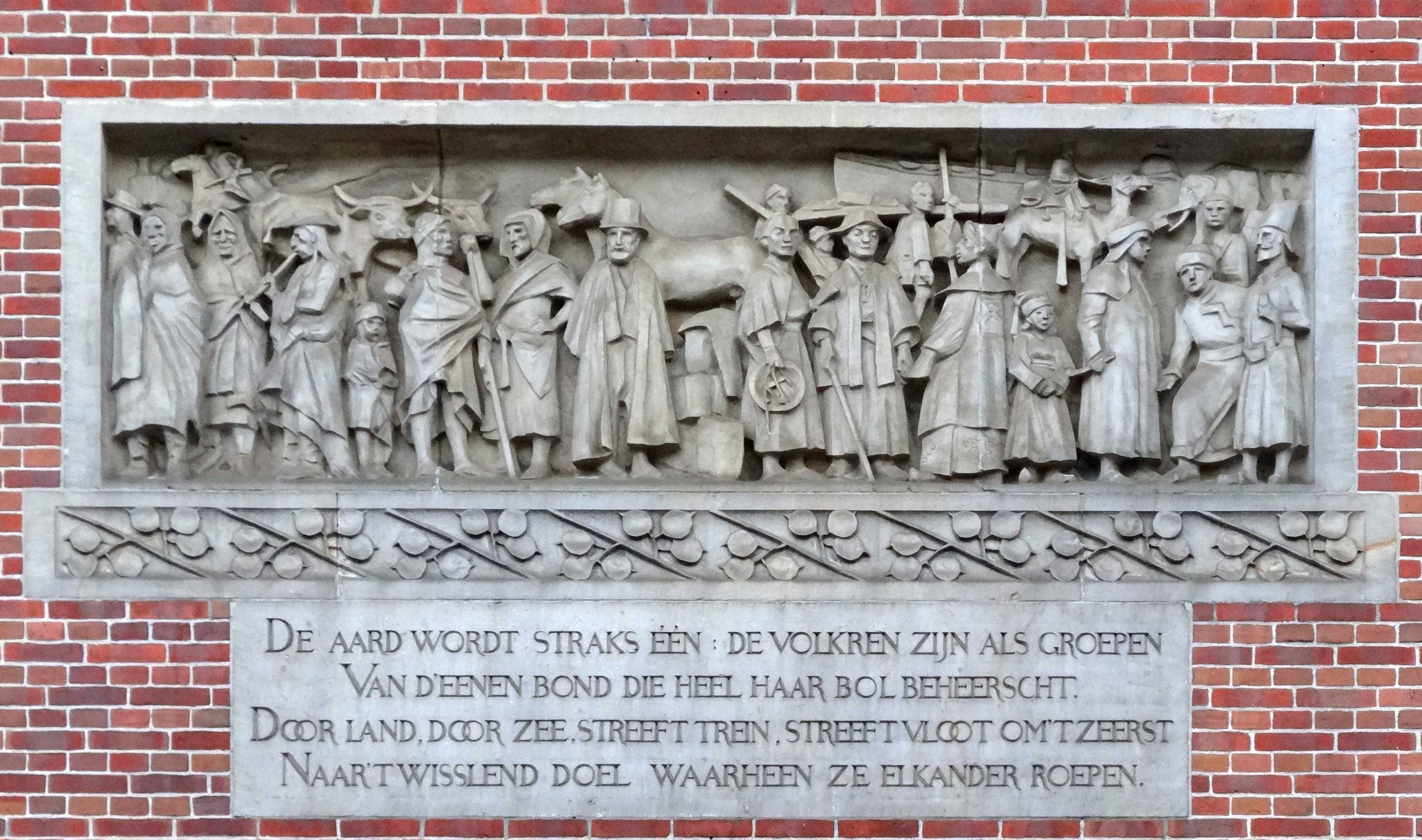 Gevelreliëf op de beurs van Berlage, Damrak, Amsterdam door Lambertus Zijl met een gedicht van Albert Verweij